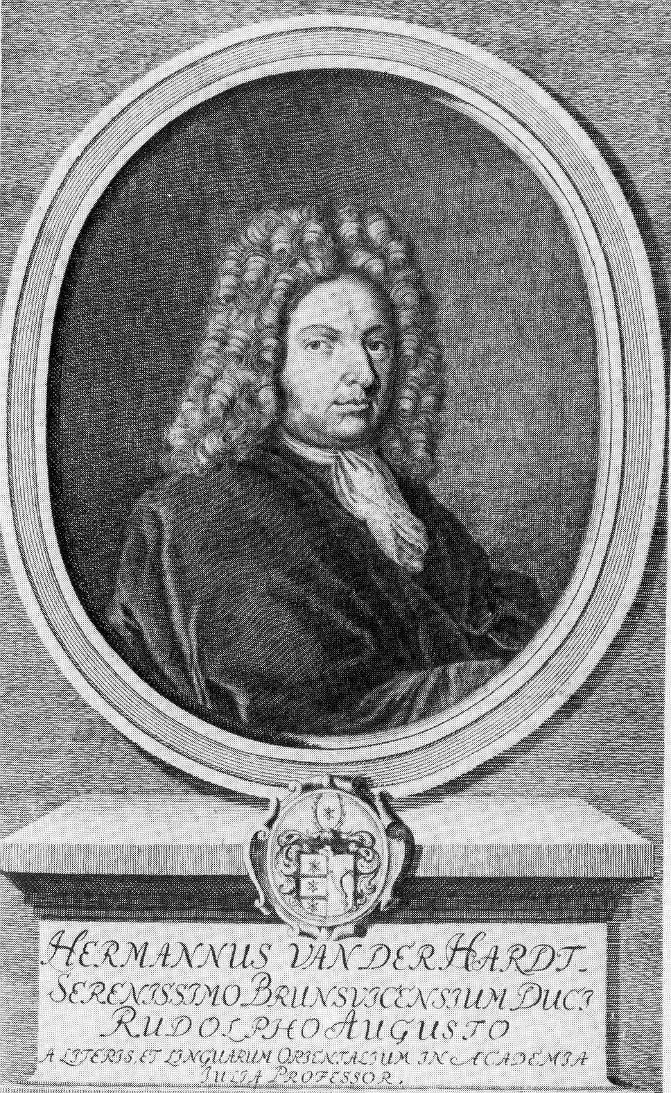 Hermann von der Hardt (1660–1746), Professor an der Universität Helmstedt.